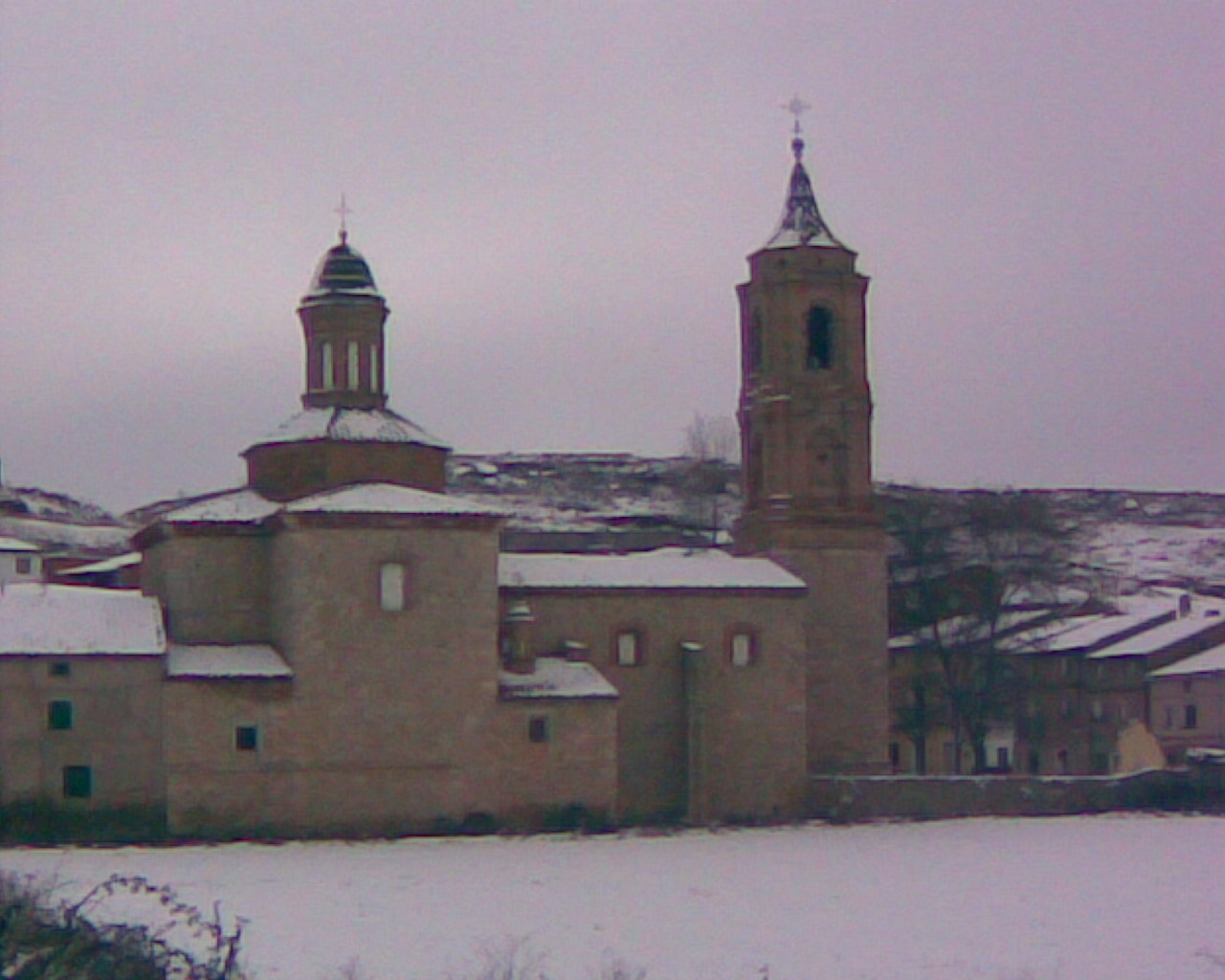 Se trata de la vista de la Iglesia Parroquial de Villarroya del Campo dedicada a Ntra. Señora del Rosario. La imagen está tomada en Enero de 2009 tras una importante nevada que dejó el pueblo blanco como antaño.